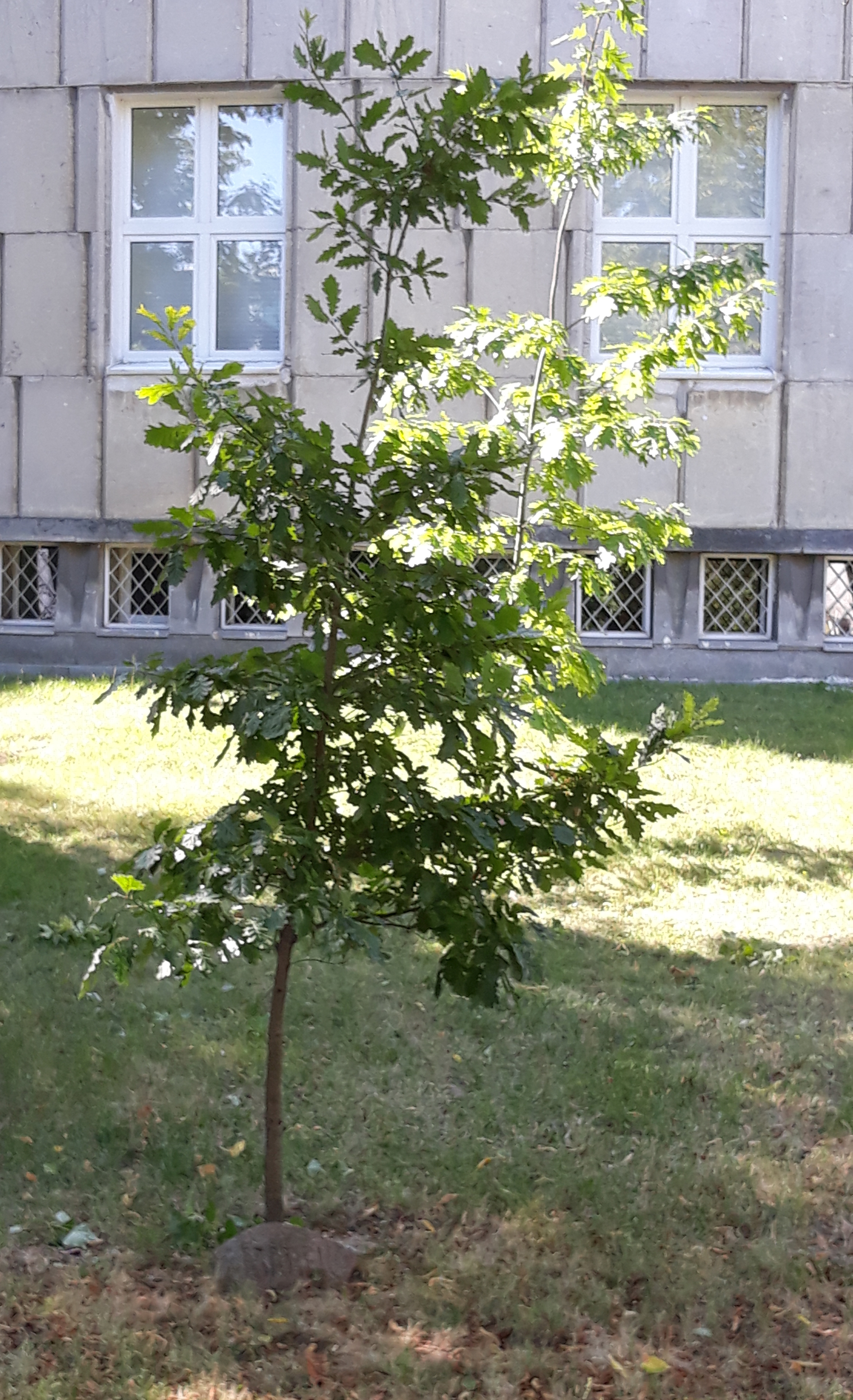 Dąb pamiątkowy Marek posadzony przed Archiwum Akt Nowych w Warszawie. Upamiętnia Marka Krawczyka, który przekazał swoje archiwa.